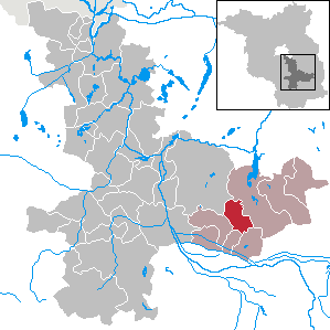 Spreewaldheide in Brandenburg (Country) - District Dahme-Spreewald